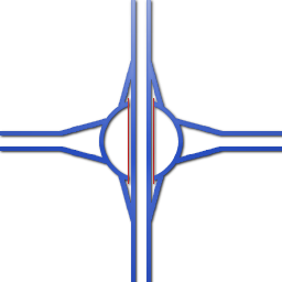 Een schema van een verkeersplein (rotonde dus) met 1 doorgaande weg, gemaakt door mezelf.